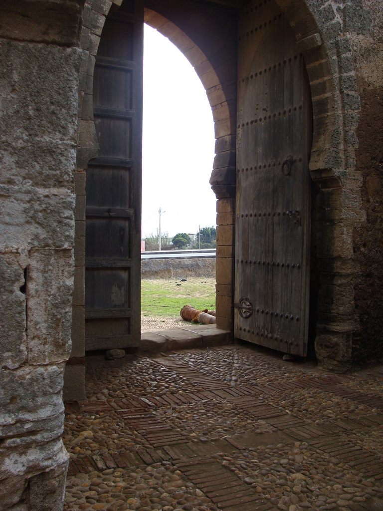 Kasbah Mehdia, Portail